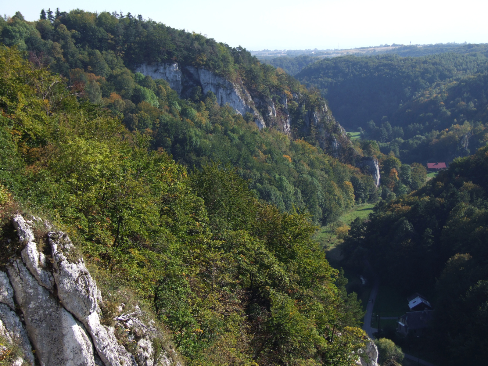 Dolina Prądnika (Ojcowski Park Narodowy)